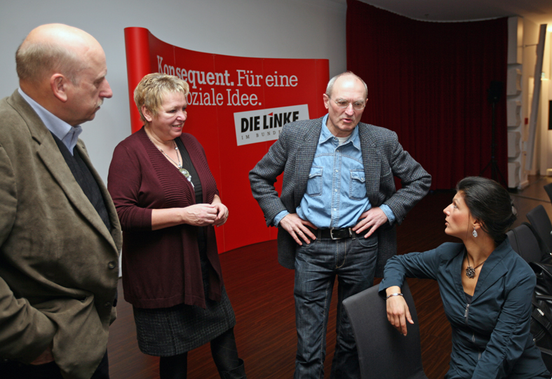 Manfred Sohn im Gespräch mit Sahra Wagenknecht, Ursula Weisser-Roelle und Hans-Henning Adler